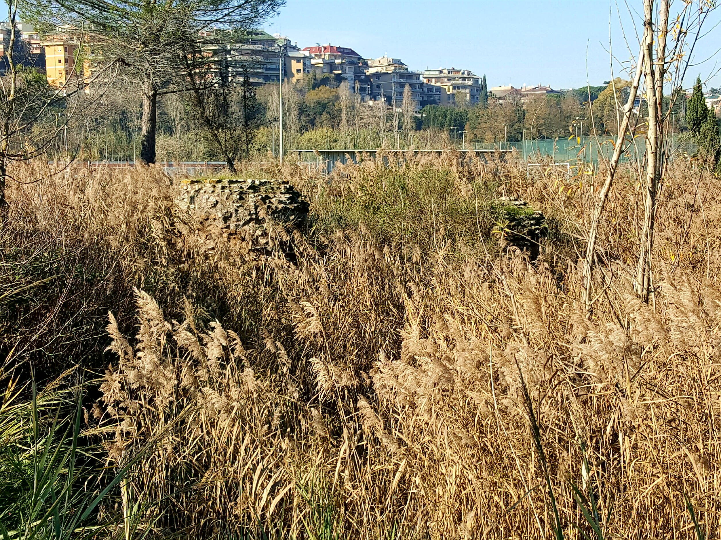 Area di ritrovamento e resti del Mausoleo di Tor di Quinto a Roma, vicino al Tiro a segno nazionale.